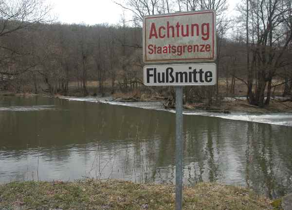 Österreichisch-tschechische Staatsgrenze in Hardegg an der Thaya / Niederösterreich / Europäische Union. Aufschrift Tafel: "Achtung Staatsgrenze. Flussmitte."